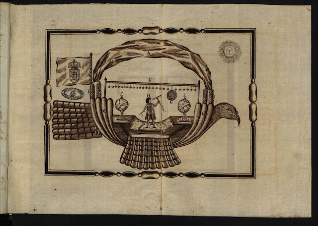 Descrição da Passarola